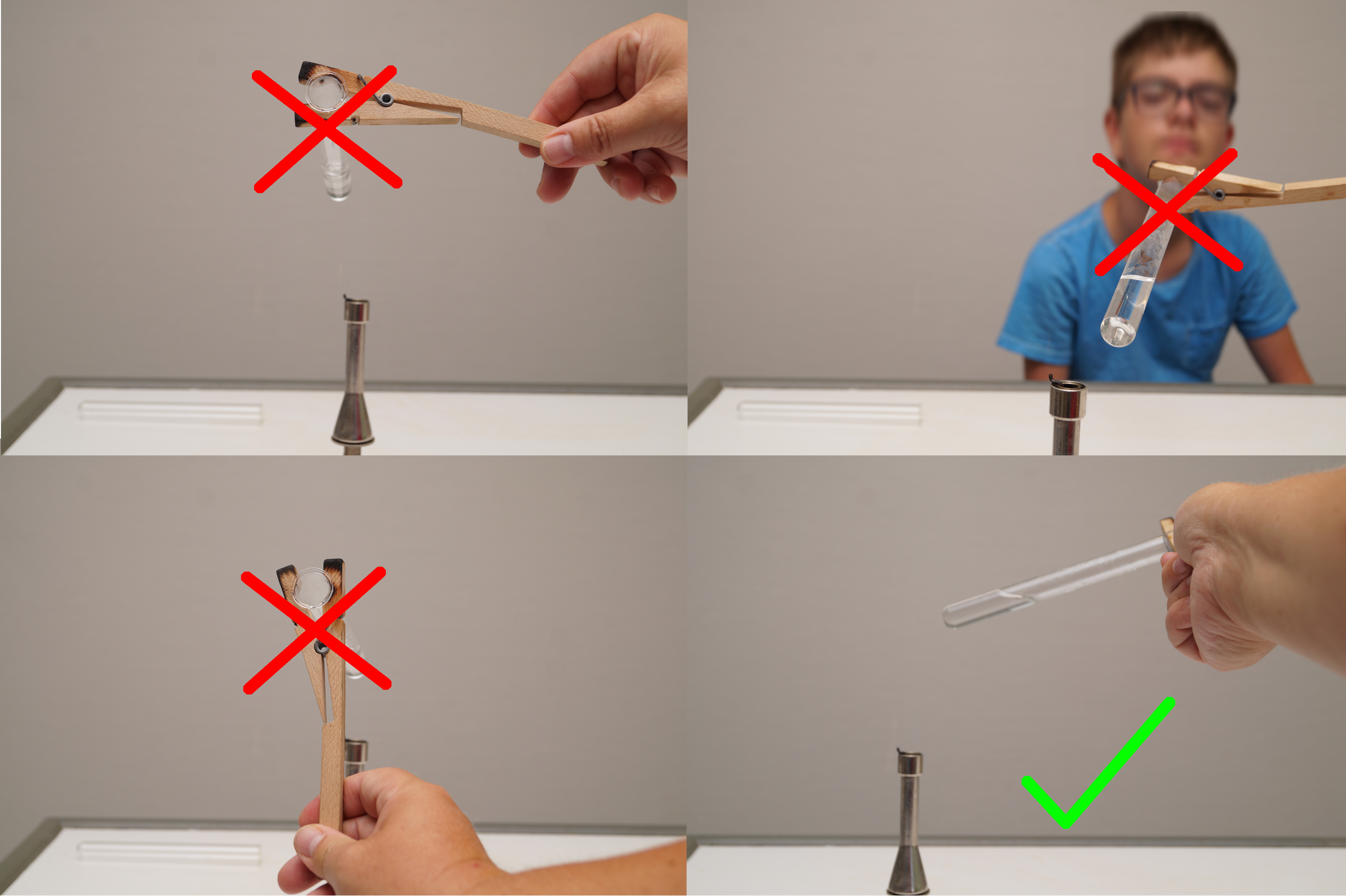 Foto mit Laborgerät, um Informationen zur richtigen Handhabung zu geben. Die Öffnung des Reagenzglases beim Erhitzen von Flüssigkeiten sollte beachtet werden.